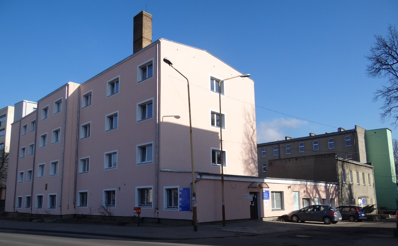 Szpital, 2016 r. Szpital Rehabilitacyjny im dr Zbigniewa Petriego